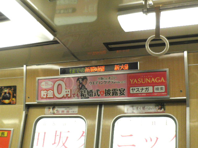 8006Fに取り付けられているLED駅名表示器